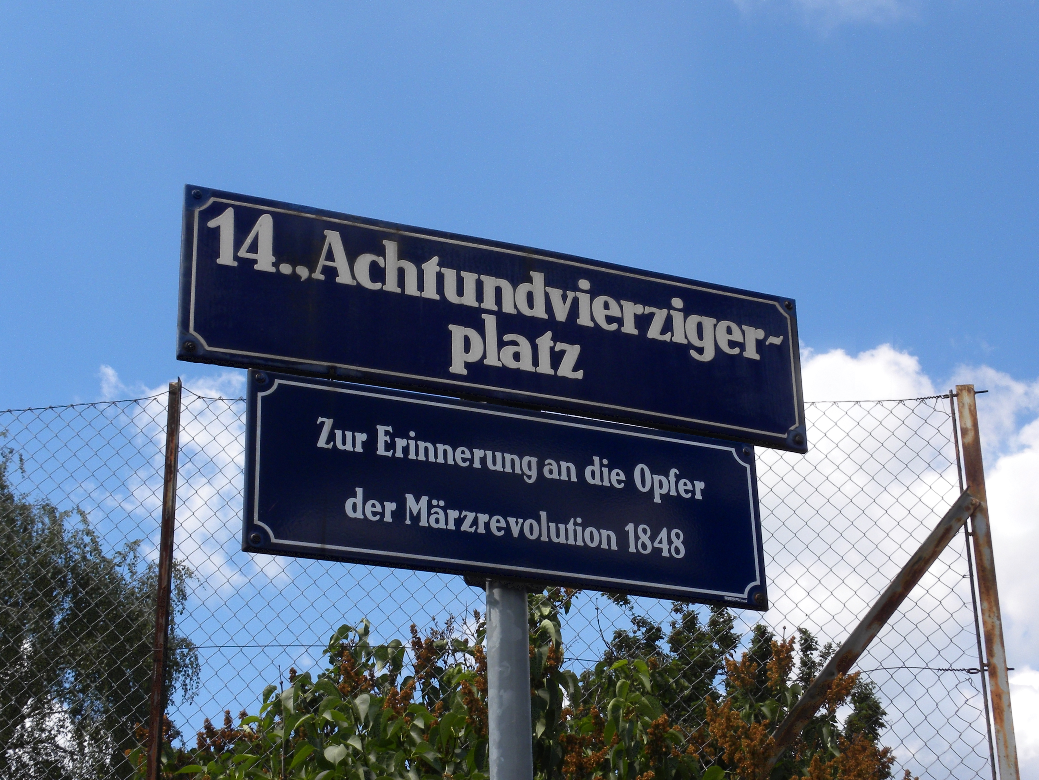 Die Straßen, Gassen und Wege rund um den an die Opfer der Märzrevolution von 1848 erinnernden Achtundvierzigerplatz in Wien Penzing, Breitensee, sind nach Gefallenen der Märzrevolution benannt.